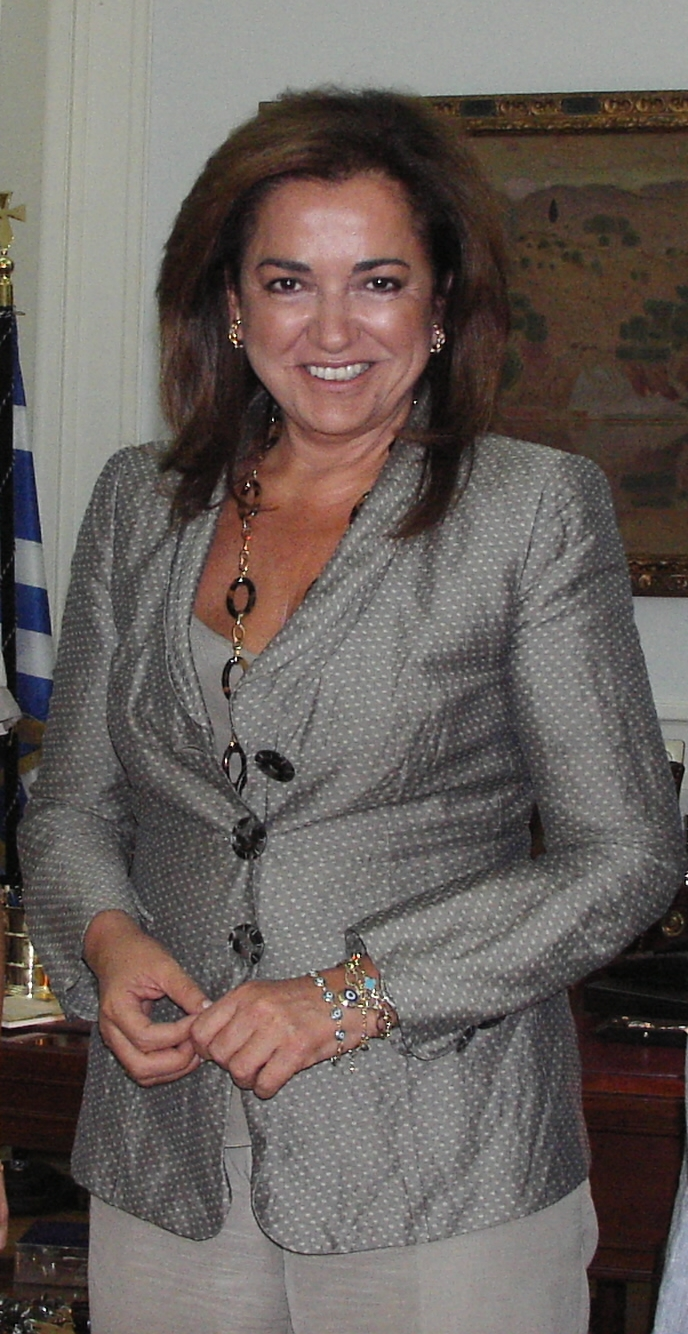 Dora Bakoyannis